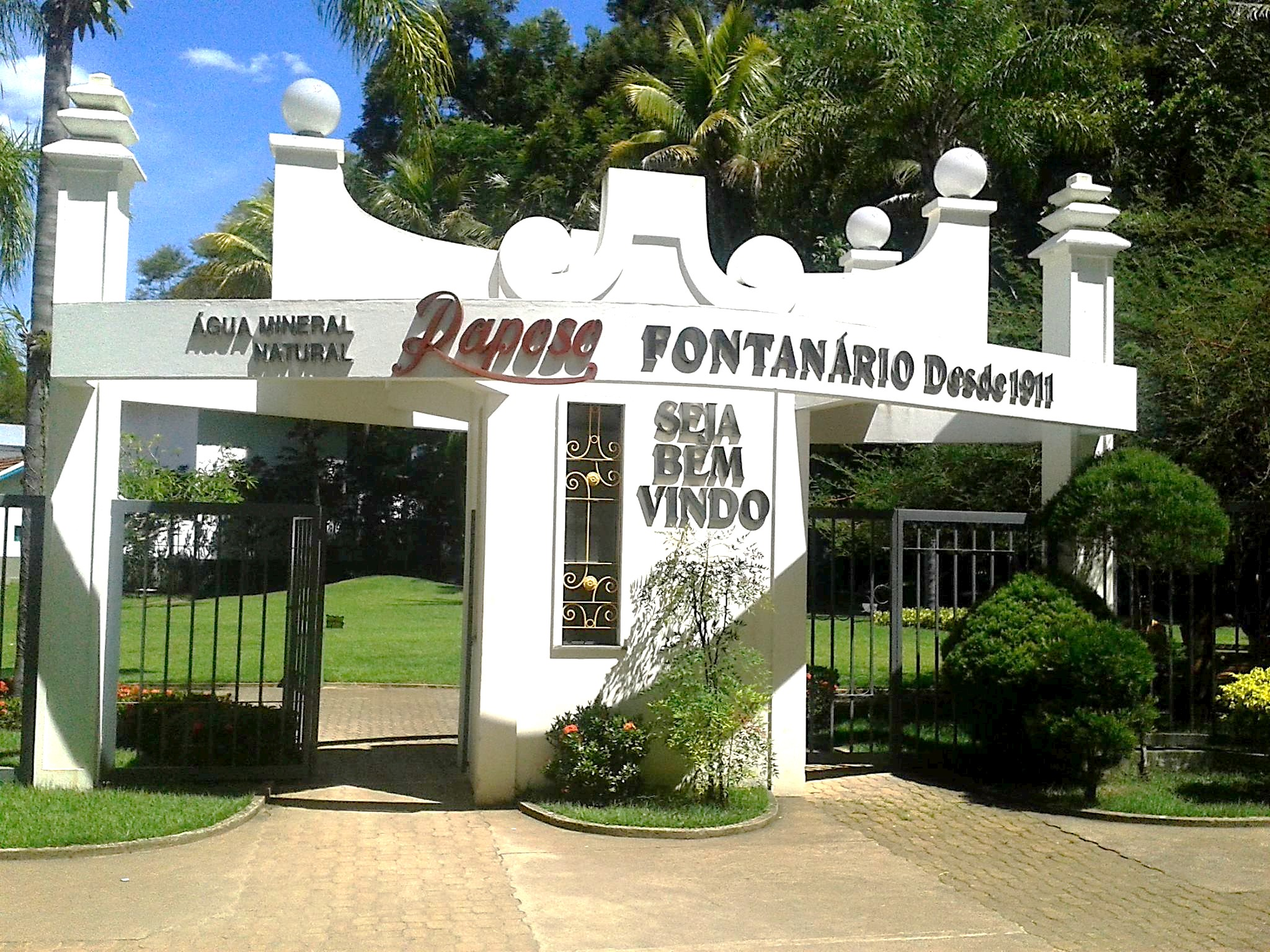 Atração turística, o Fontanário Raposo, de 1911, compõe-se de três diferentes águas carbogasosas, cada qual com sabor e propriedades terapêuticas próprias. Pertence ao Hotel Fazenda Raposo.